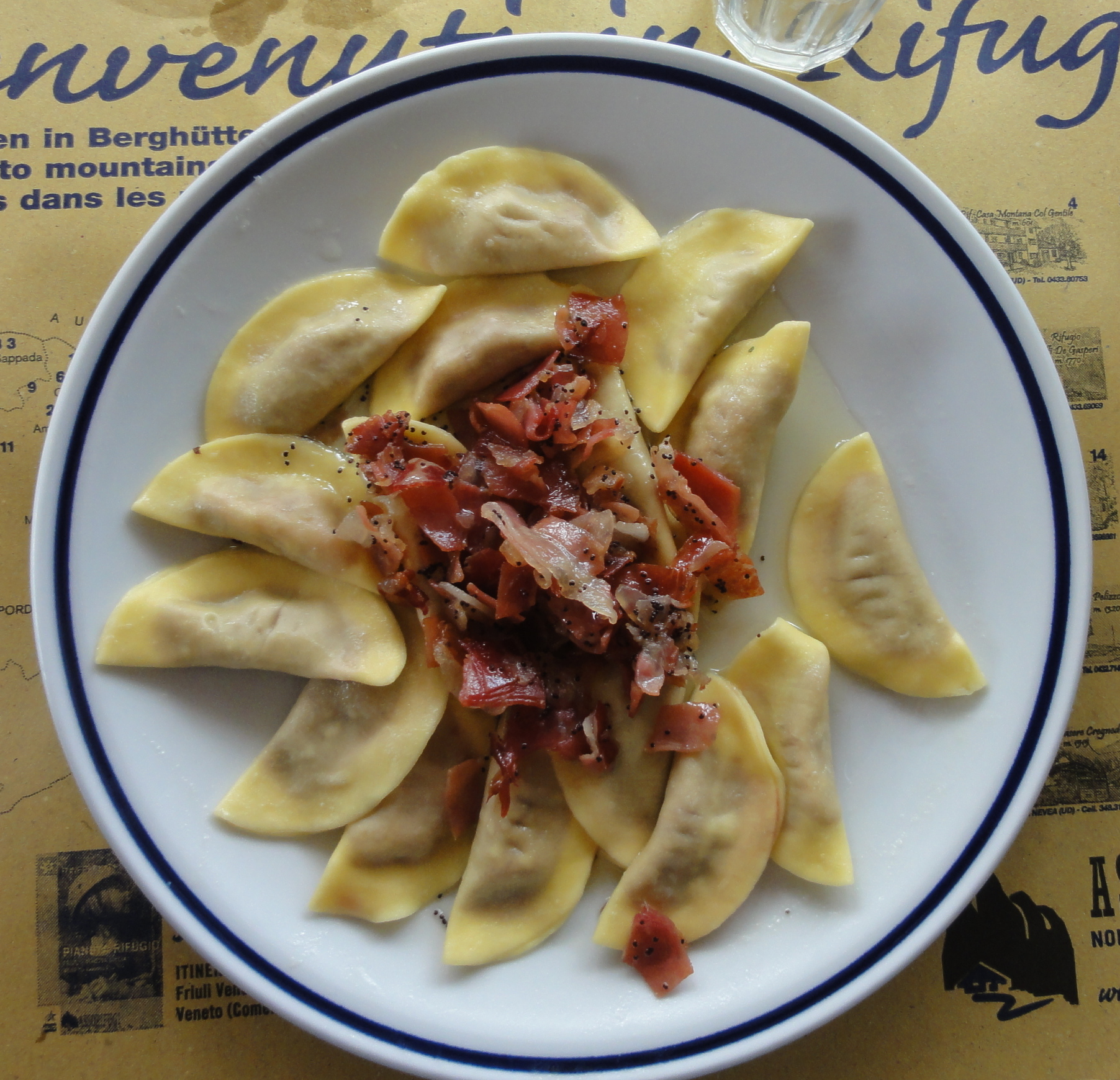 Casunziei alle rape rosse al rifugio Venezia